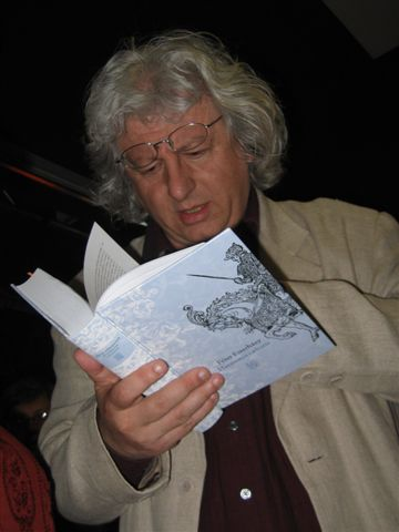 Péter Esterházy (1950-2016), Hungarian writer